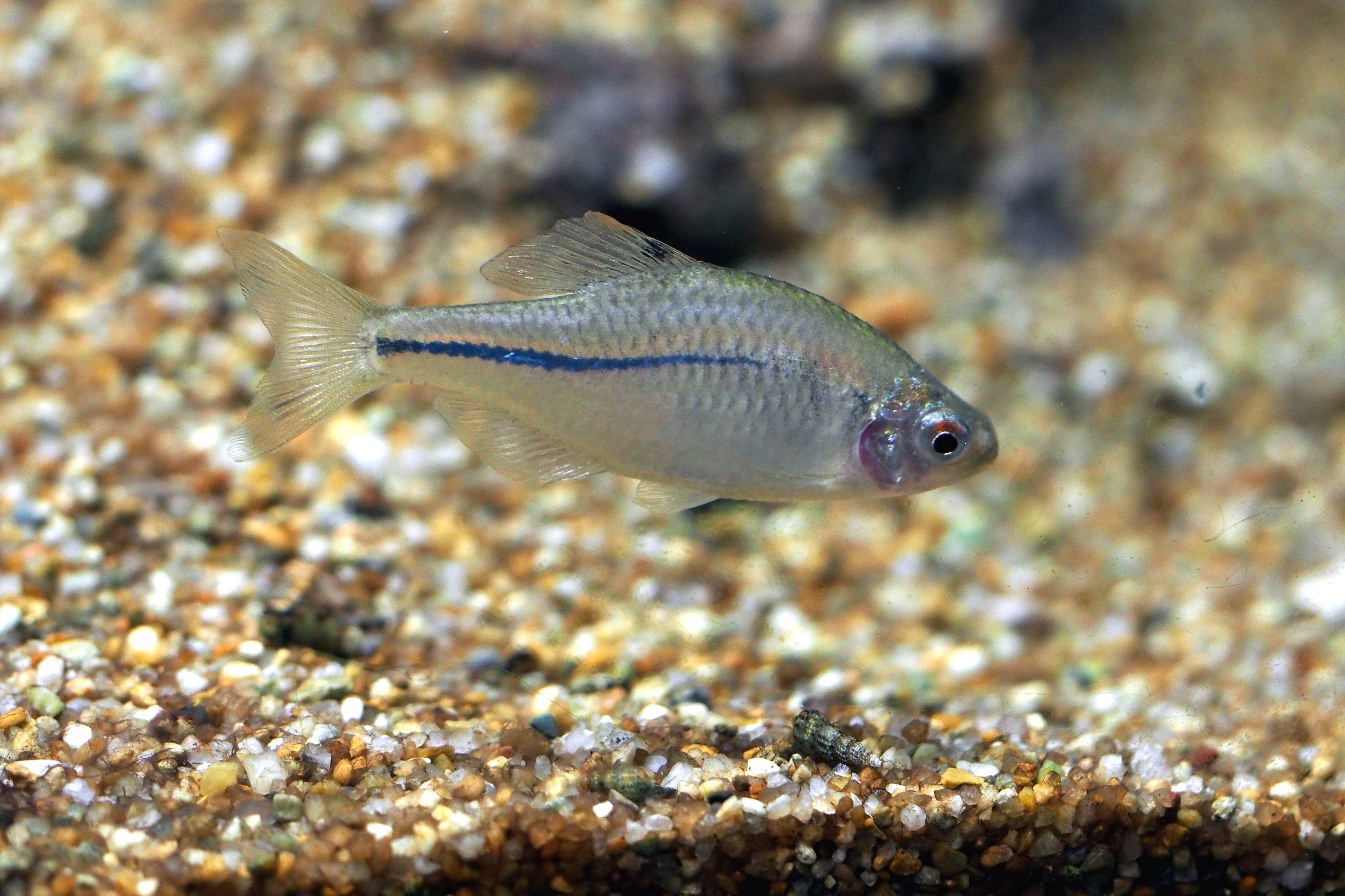 スイゲンゼニタナゴ. at Suma aquarium.